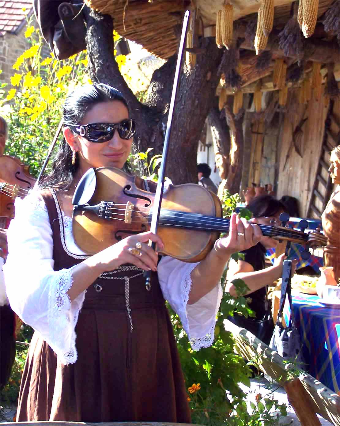 Ragazza rom che tiene il violino in mano